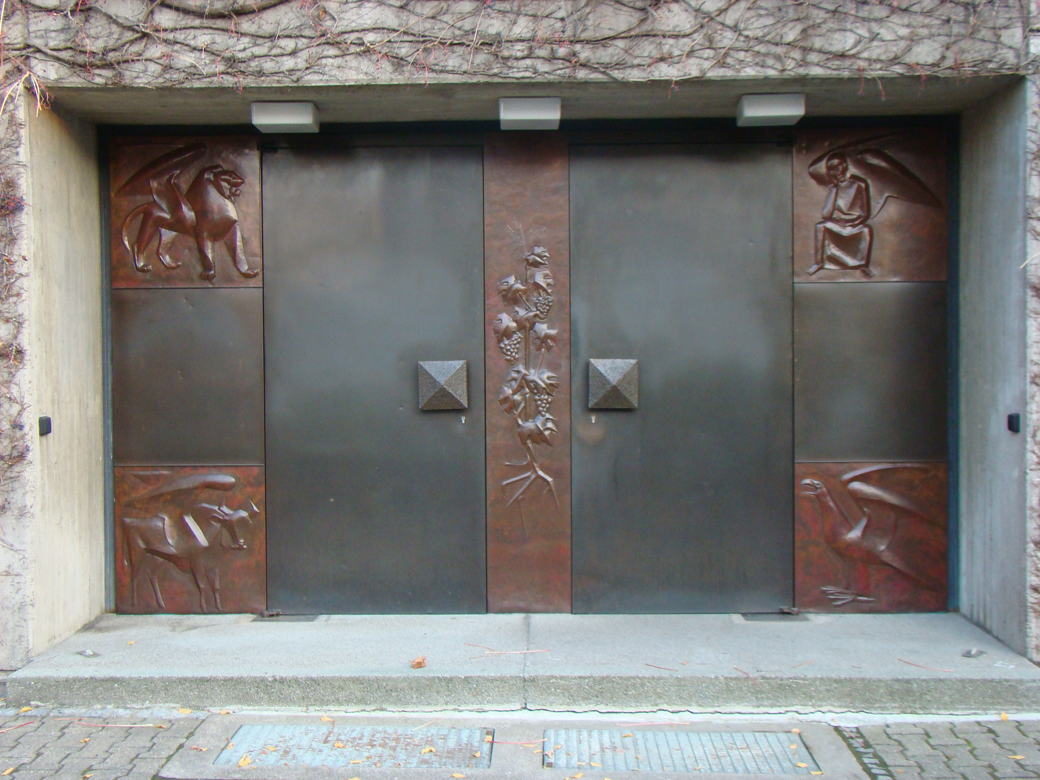 Wartbergkirche in Heilbronn, Tür mit Bauschmuck von Fritz Melis. Foto: Peter Schmelzle 2011